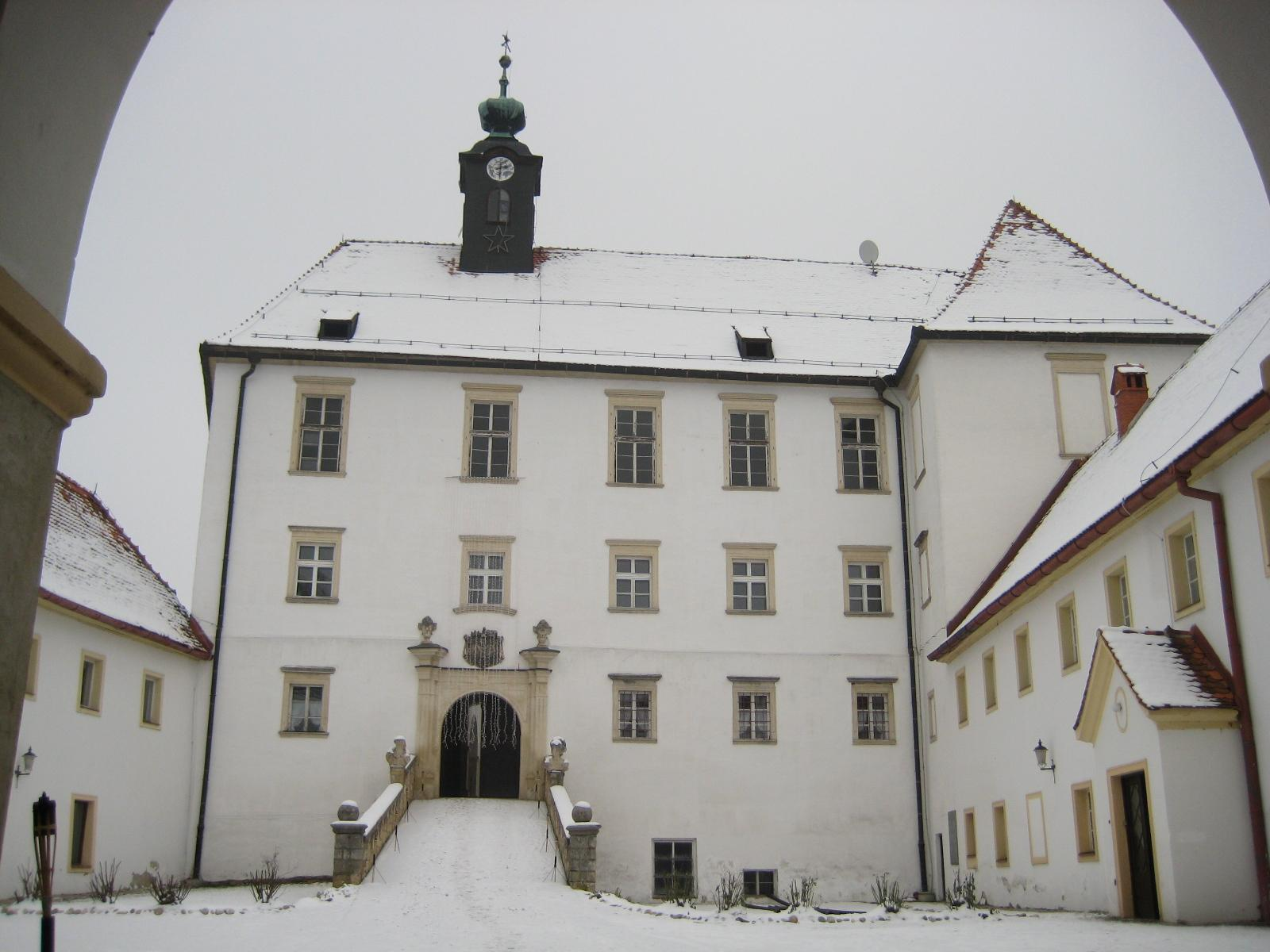 Gornja Radgona castle, Slovenia